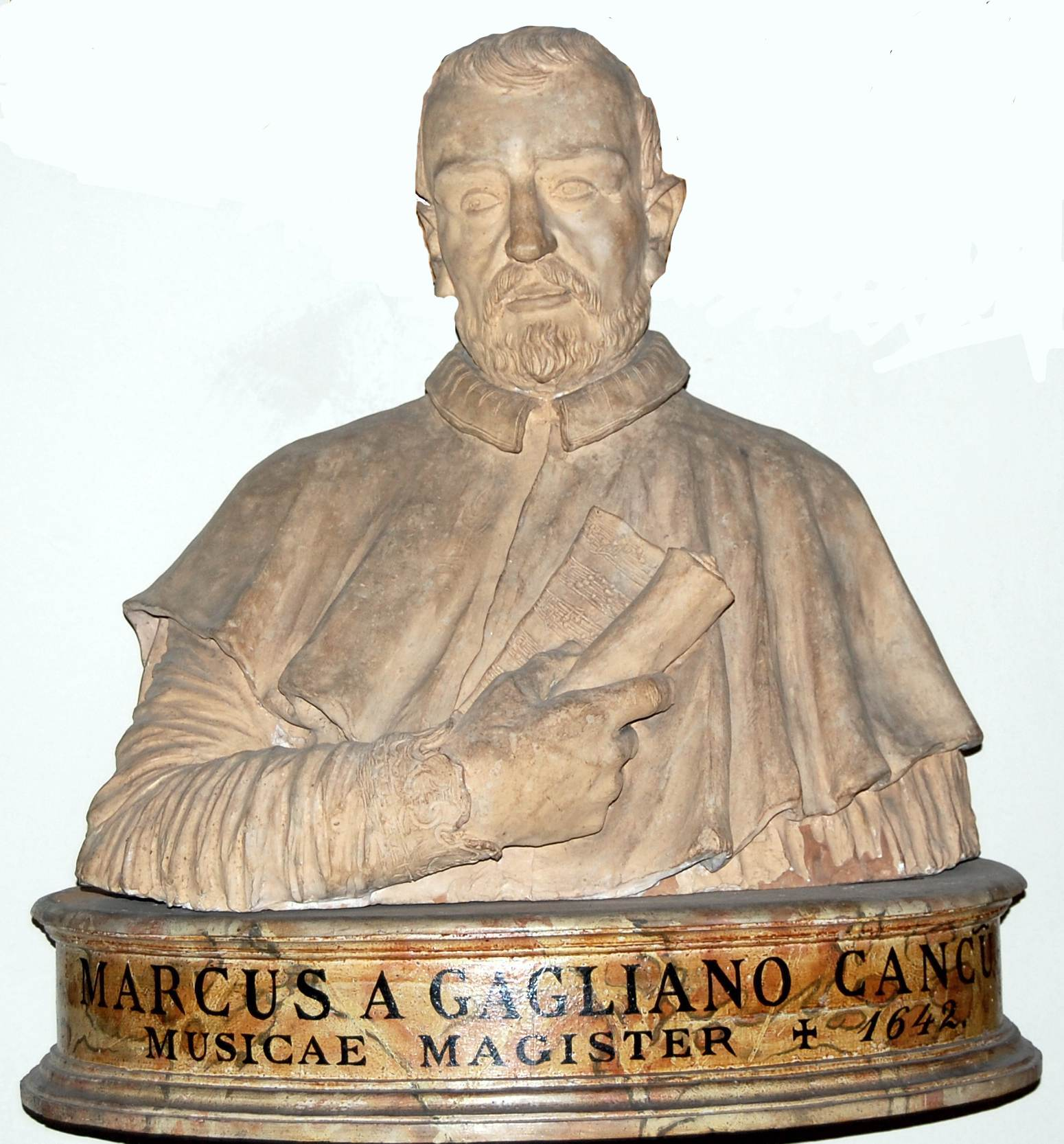 Ritratto anonimo di Marco da Gagliano (busto in terracotta) XVII, Basilica di San Lorenzo (Firenze)